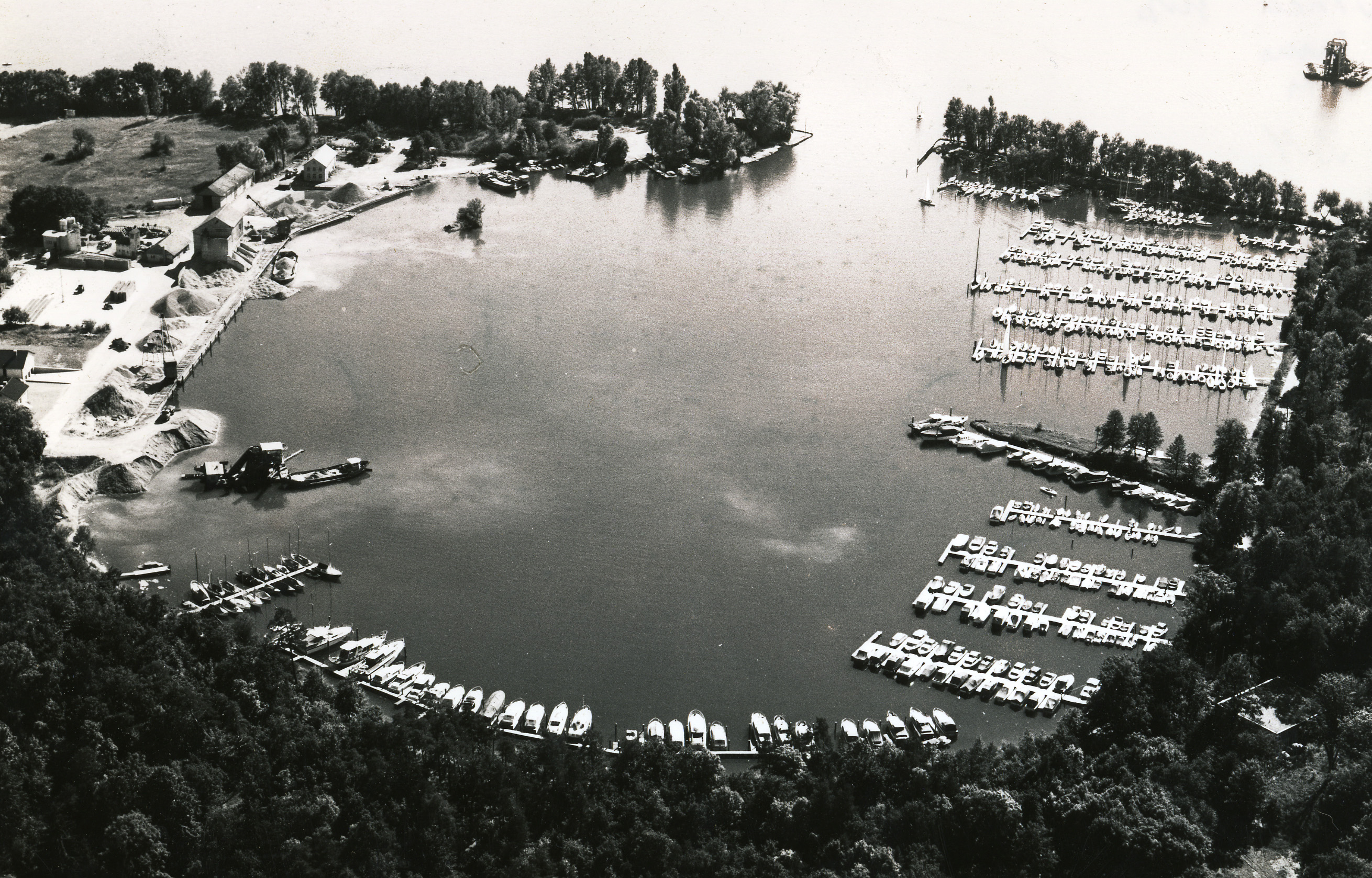 Kressbronn am Bodensee 1970